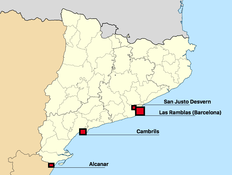 Ubicación de los atentados en Cataluña de 2017 Wikipedia: 2017 Catalonia attacks See also category: 2017 Barcelona attack.